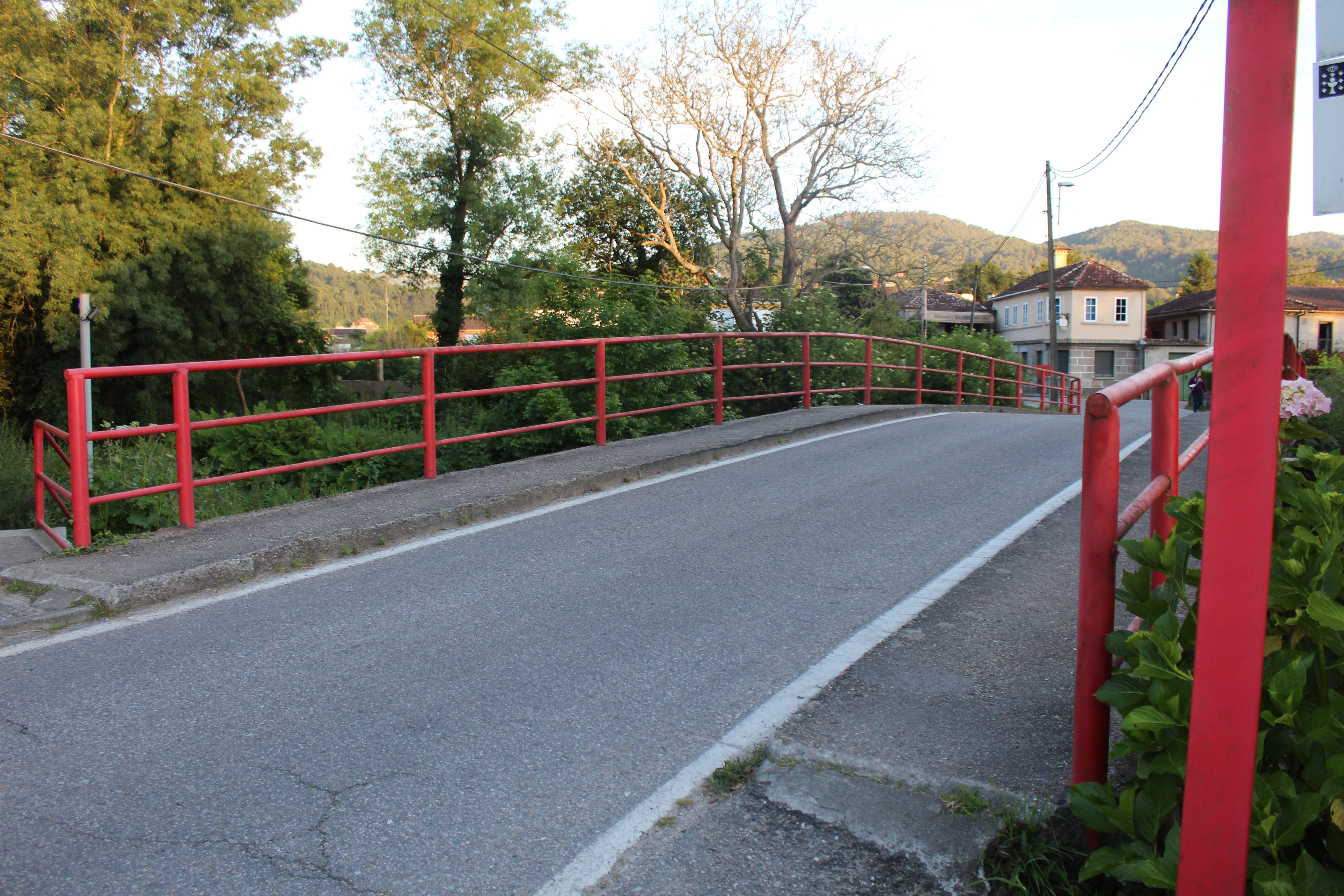 Núcleo urbano da Ponte